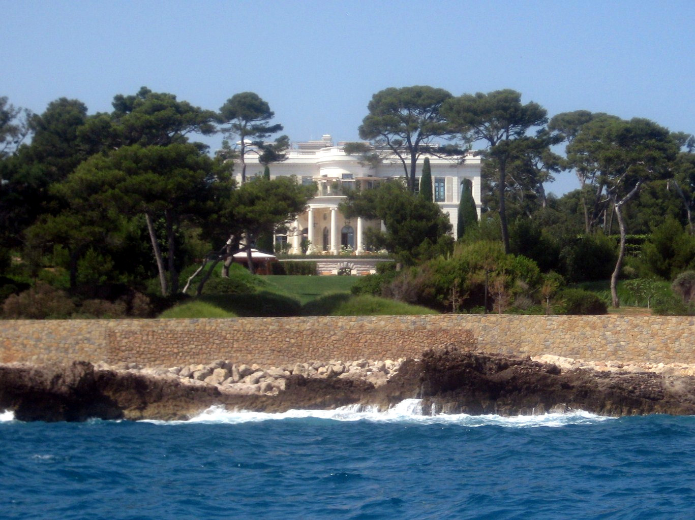 Description château de la Croë Antibes Date04 decembre 2011Sourcemon appareil photoAuthorAimelaimePermission (Reusing this file) château de la Croë Antibes